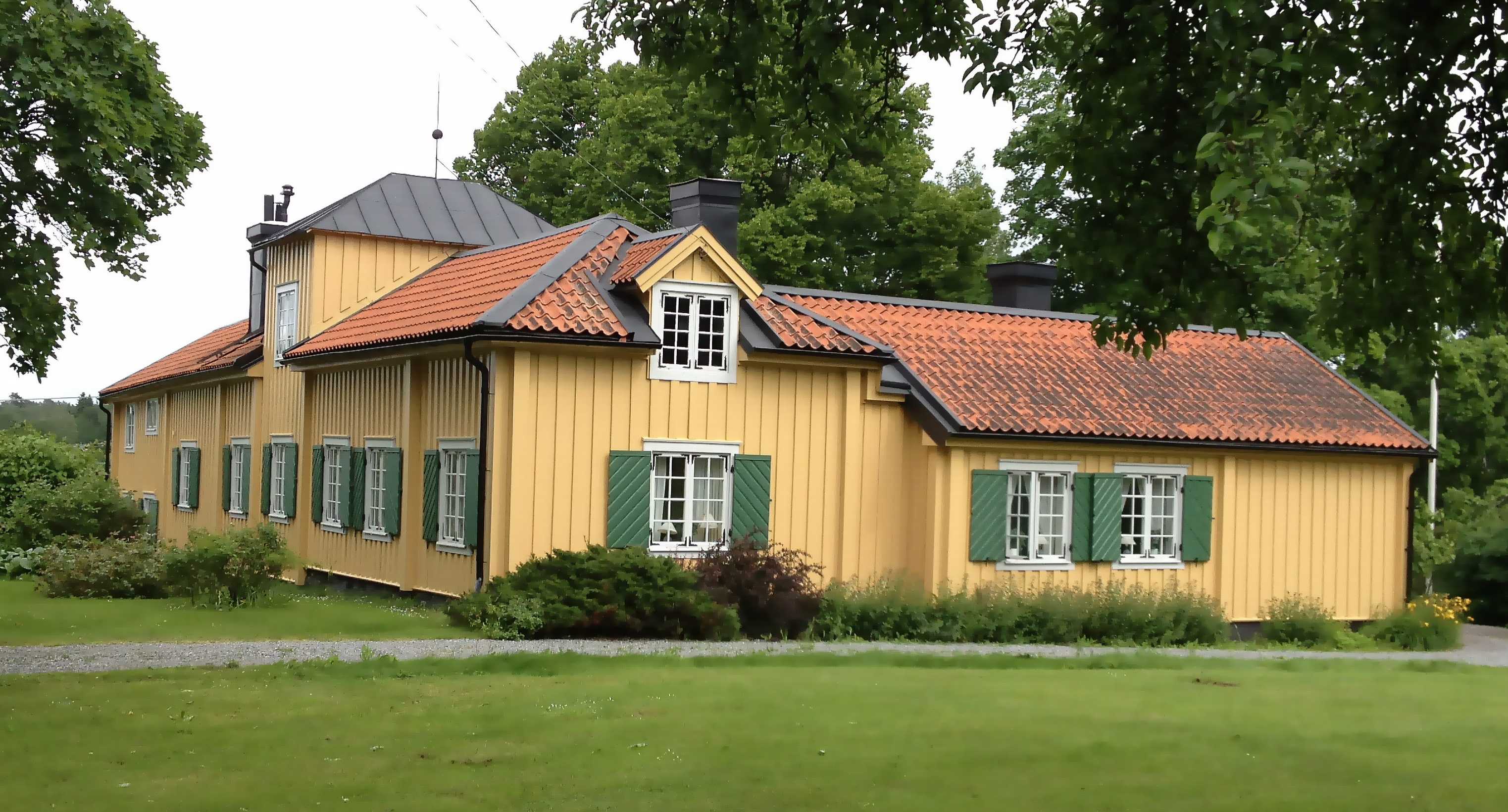 Berga gård, Danderyd. Huvudbyggnaden strax söder om Danderyds kyrka.